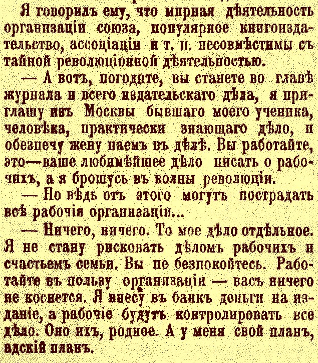 Фрагмент из бесед писателя С. Я. Стечкина с Георгием Гапоном